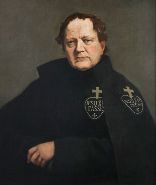 Photo d'un tableau de Georges Spencer